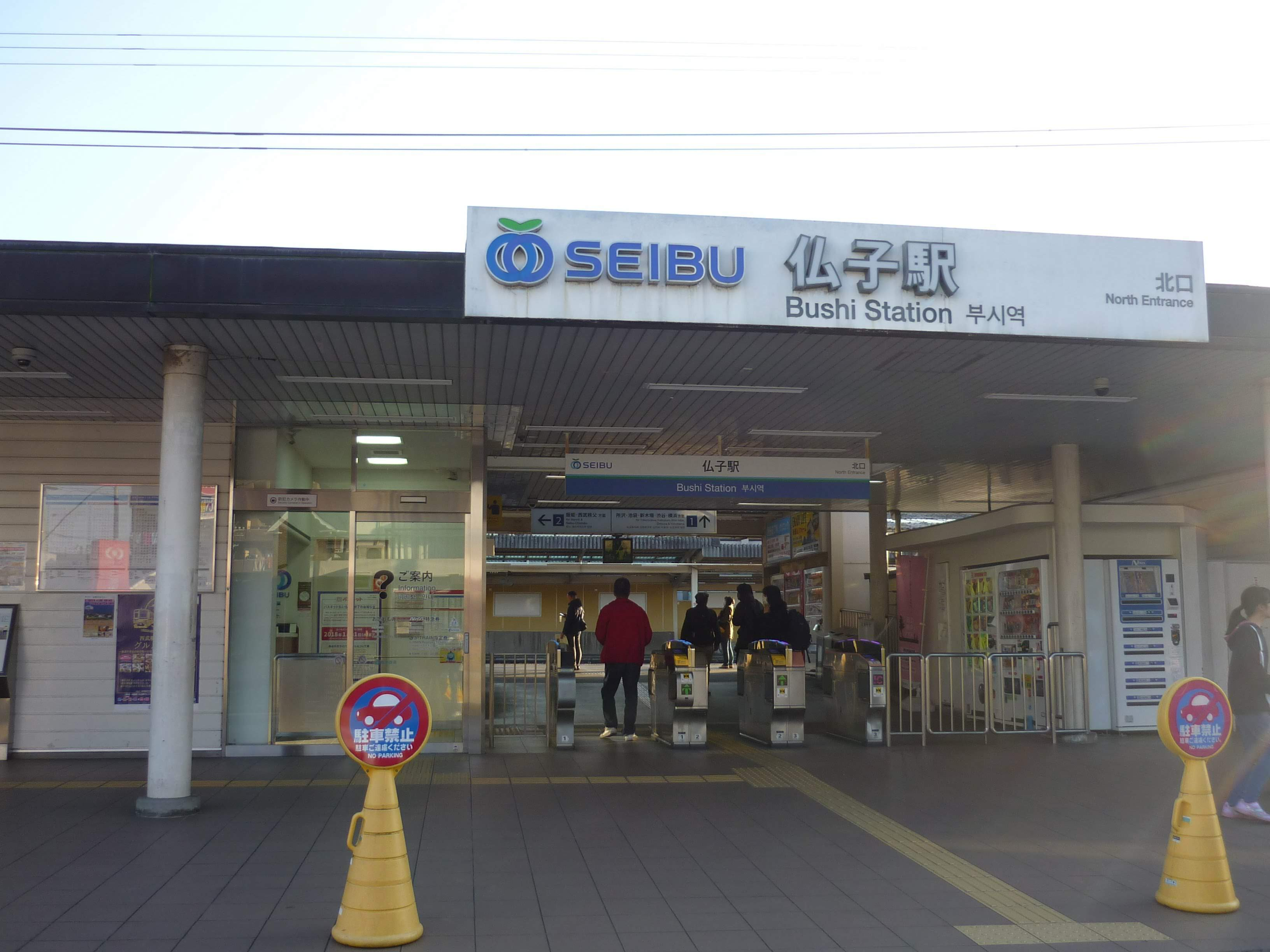 西武仏子駅